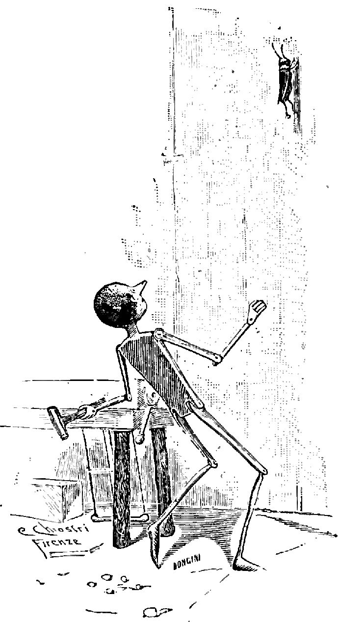 Illustrations from "Le avventure di Pinocchio, storia di un burattino", Carlo Collodi, Bemporad & figlio, Firenze 1902 (Drawings and engravings by Carlo Chiostri, and A. Bongini)